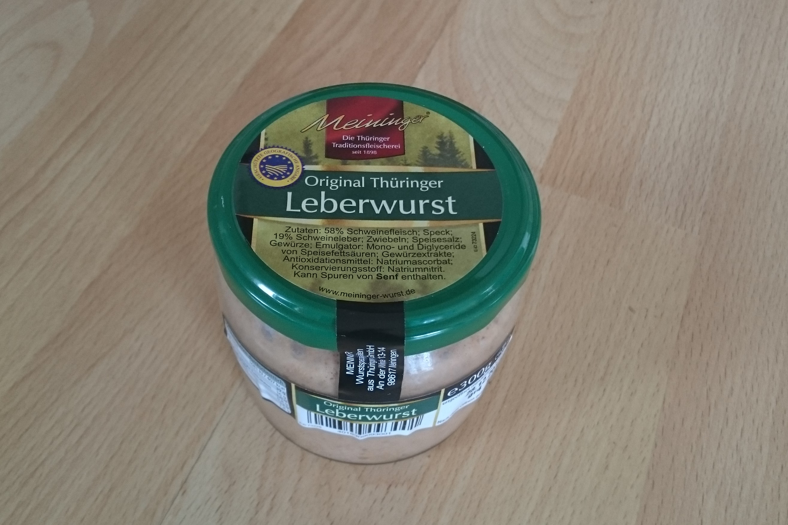 Ein Produkt der Meininger Wurstspezialitäten GmbH in der südthüringischen Stadt Meiningen